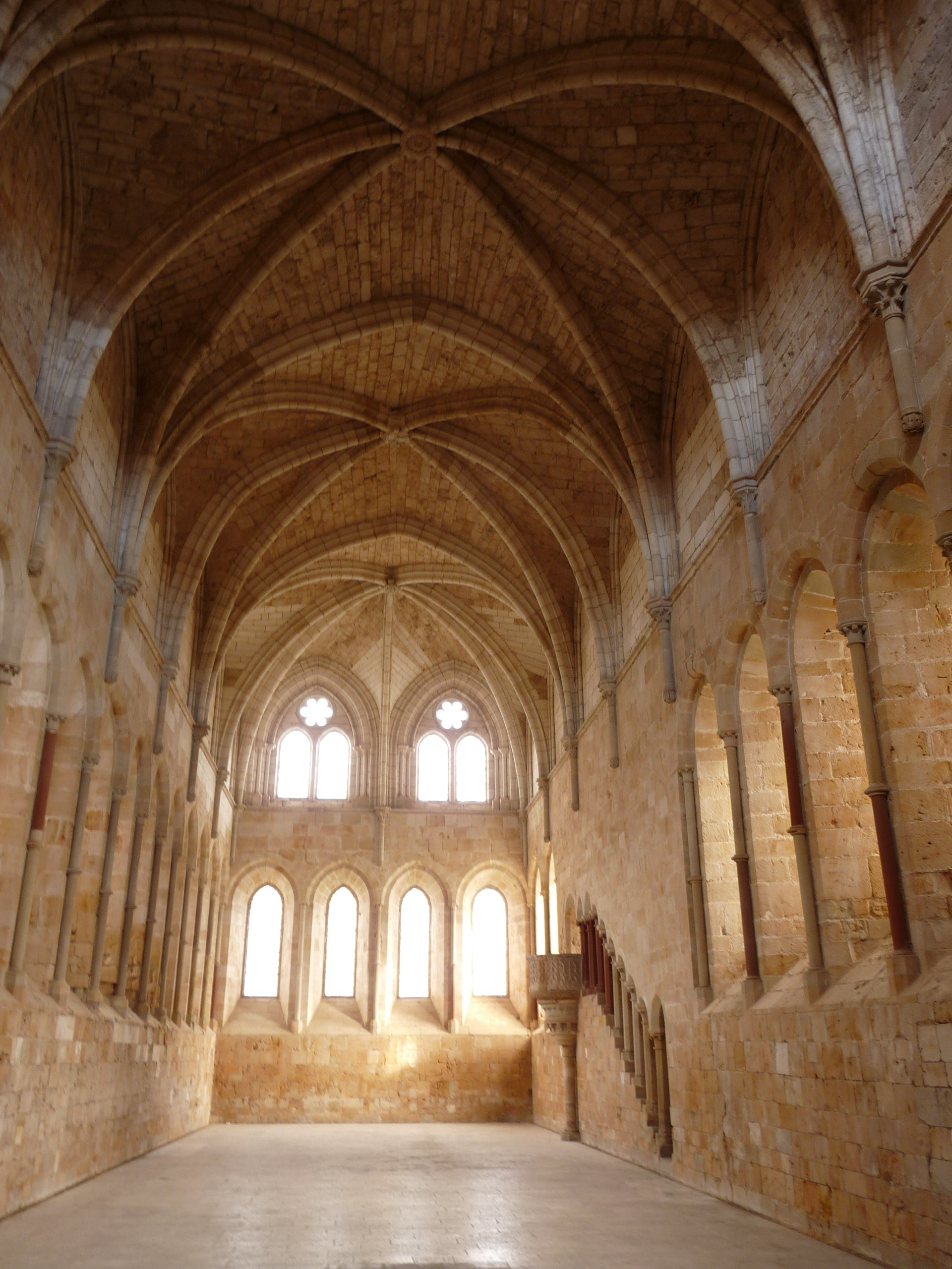 Monasterio de Santa María de Huerta - Refectorio s. XIII